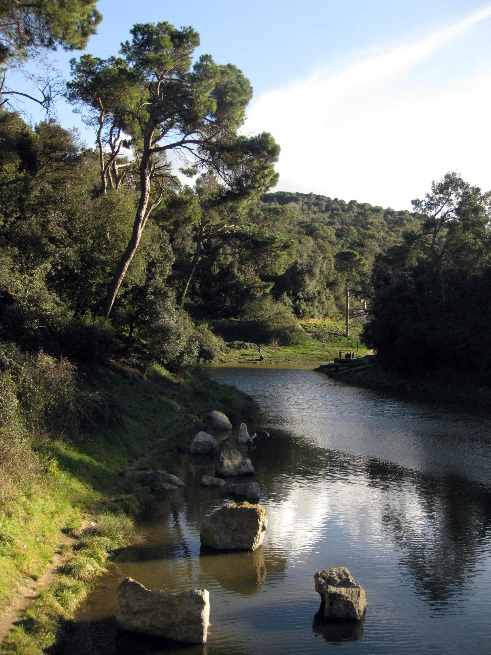 Serra de Collserola This is a a photo of a natural area in Catalonia, Spain, with id: ES510066